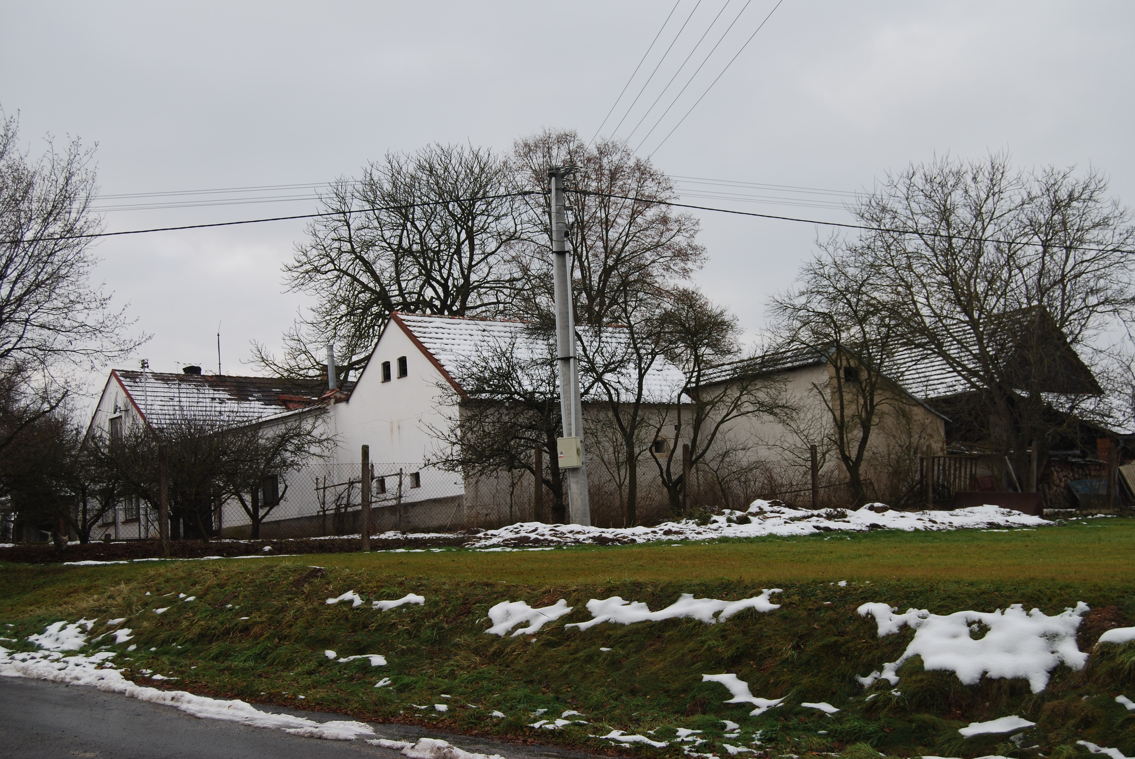 Pohled na část vsi. Hladná je část obce Albrechtice nad Vltavou v okrese Písek. Česká republika.